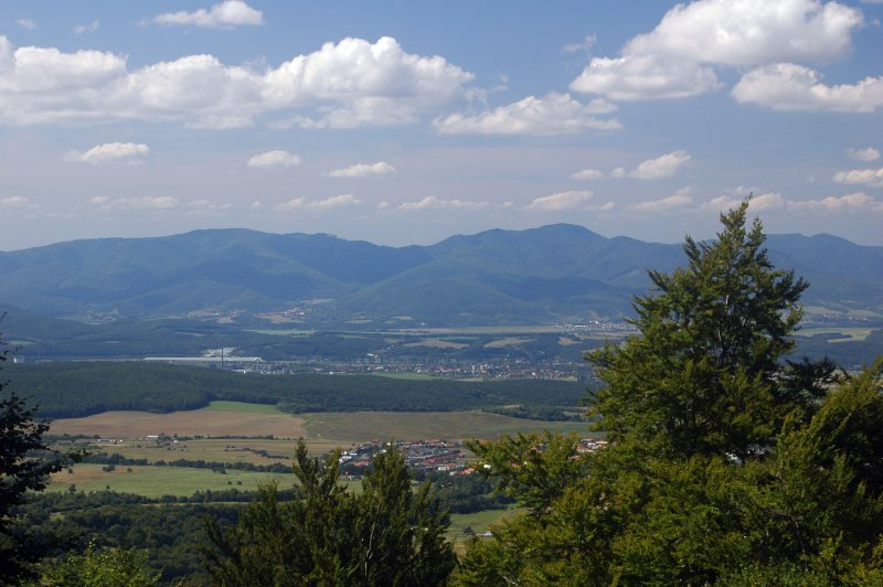 Strážovské vrchy from Vtáčnik